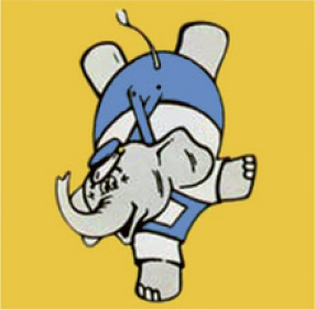 Der blaue Elefant wird verspielt inszeniert – und auch oft und gerne als lebensgrosses Maskottchen eingesetzt.